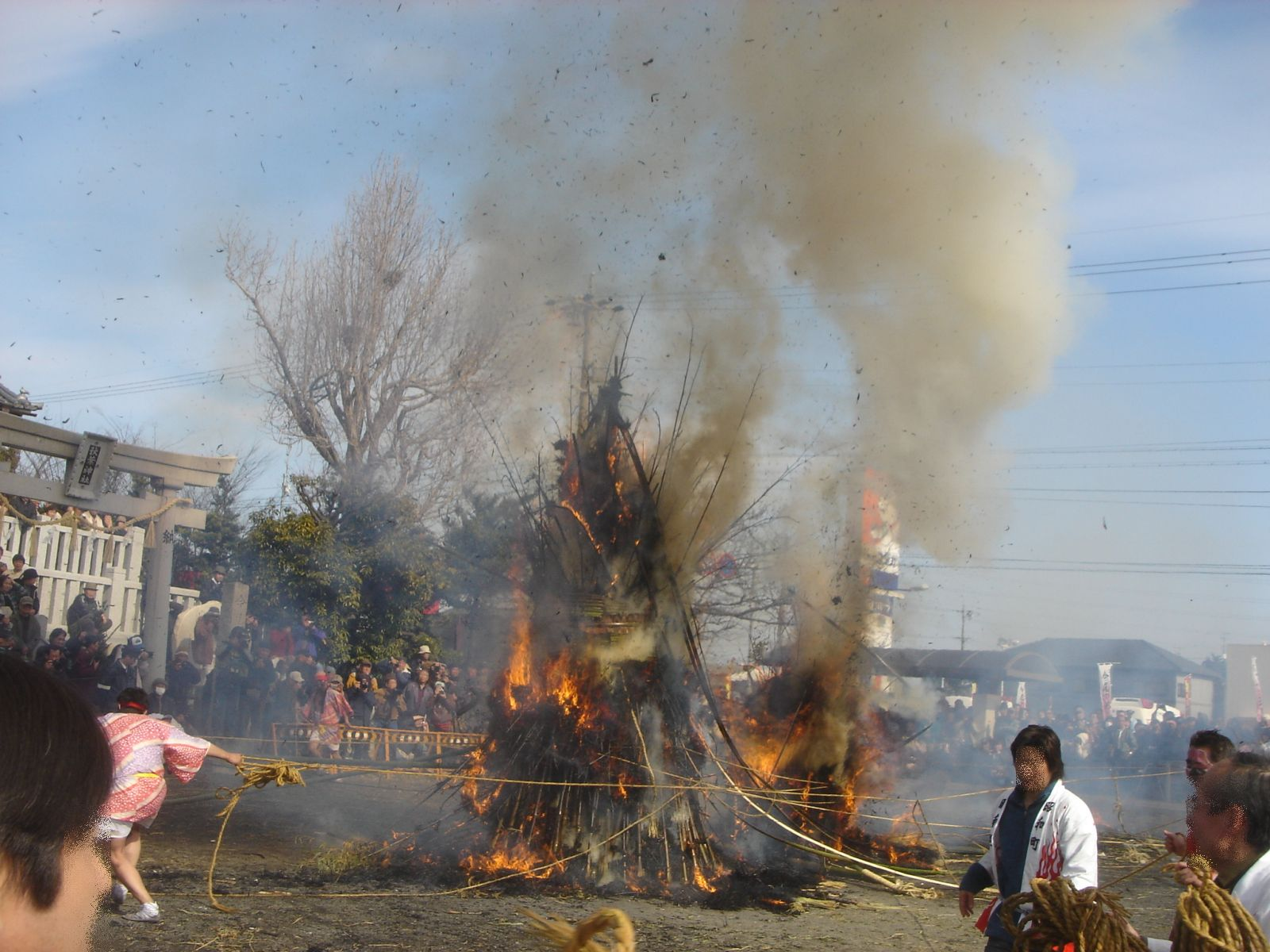 Imao-no-sagicho in kaizu city(今尾の左義長),Kaizu,Gifu,Japan(岐阜県海津市今尾,秋葉神社)で撮影。